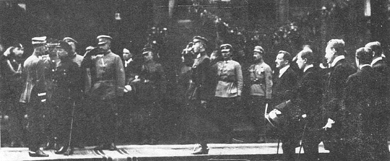 Генерал Ридз-Сміглий рапортує С. Петлюрі на плаці Київського двірця після звільнення міста від більшовиків 1920